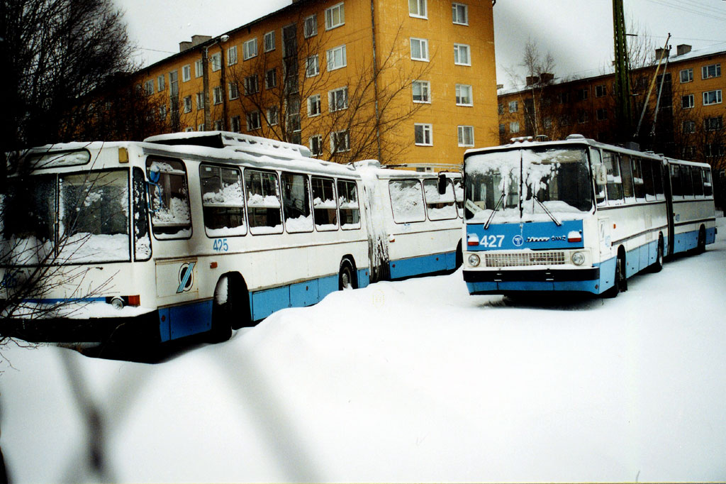 Trollibuss JuMZ-T1 (vasakul) ja Ikarus-Ganz 280T Tallinnas Paldiski mnt depoos.